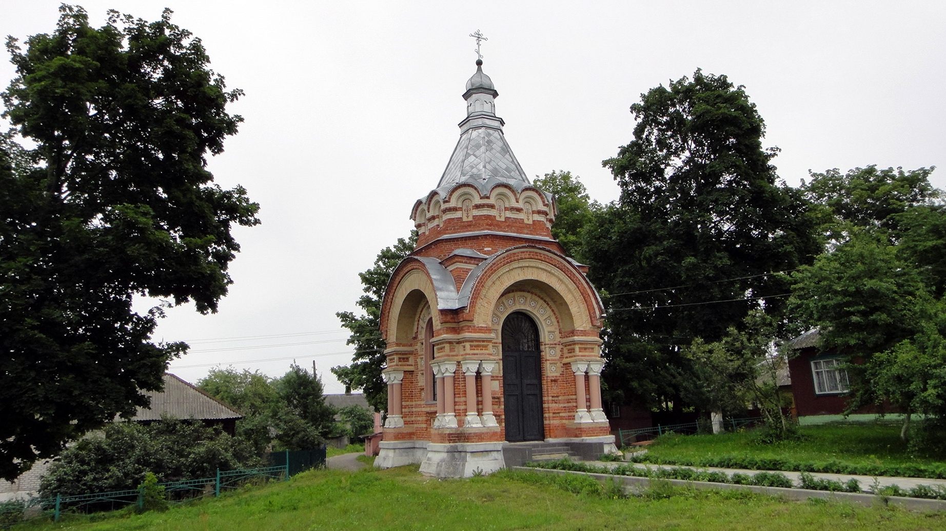 Часовня-усыпальница Искрицкой (Брянская область, Сураж, город Сураж)